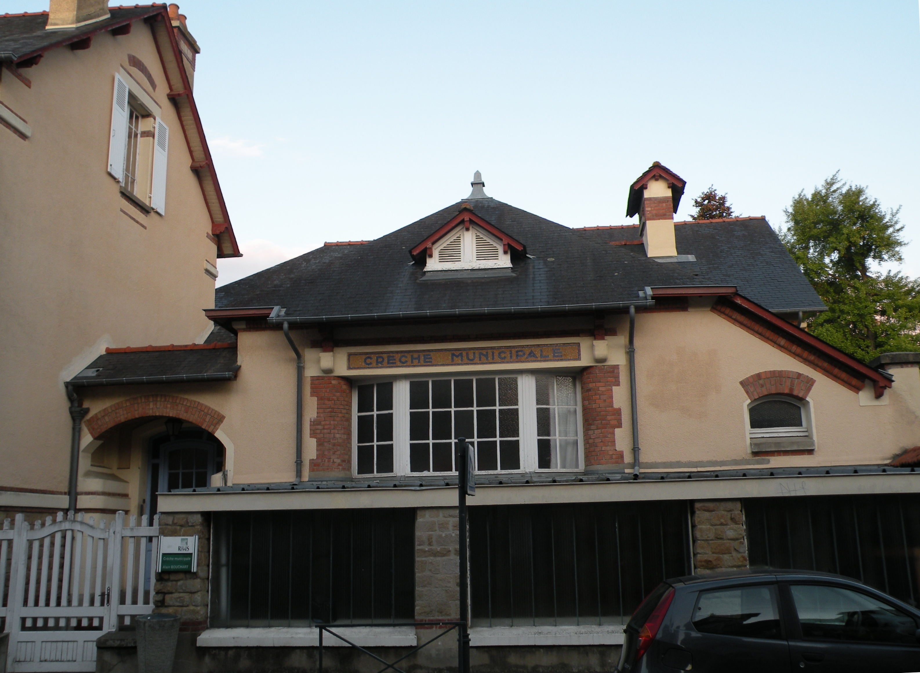 Crèche Alain-Bouchart à Rennes, construite en 1925 par Emmanuel Le Ray.